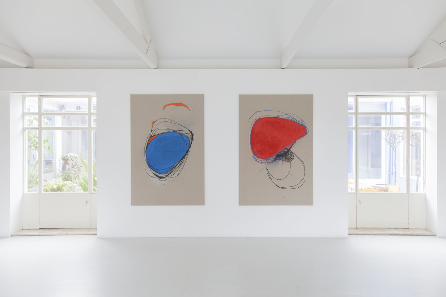 Stephane Leonard - Trauma Serie - Installationsansicht Maus Habitos Porto 2015.